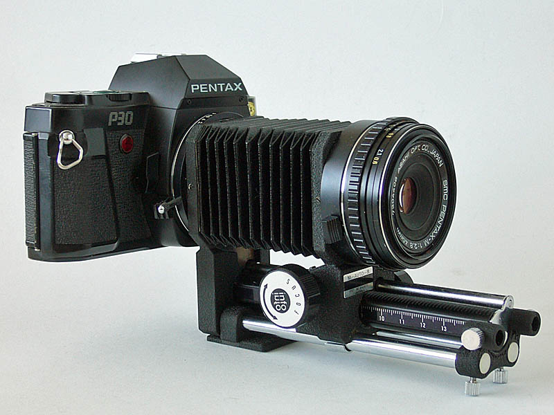 fotocamera met balg en lens